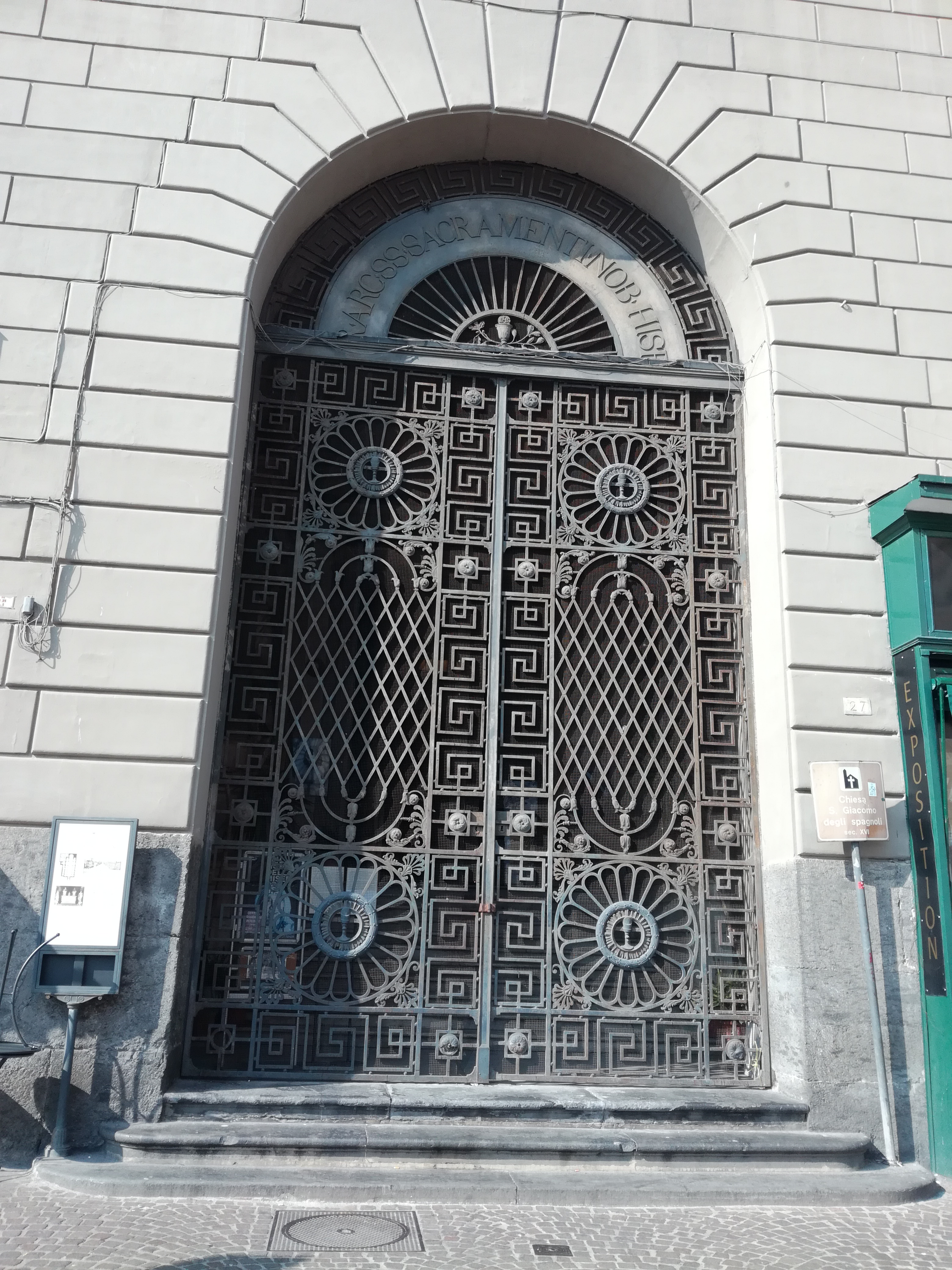 Chiesa di San Giacomo degli Spagnoli (Napoli)